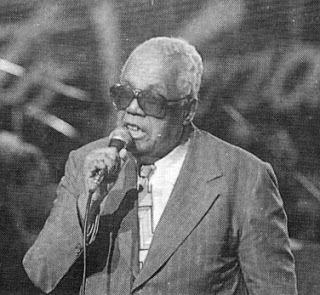 Cantante cubano